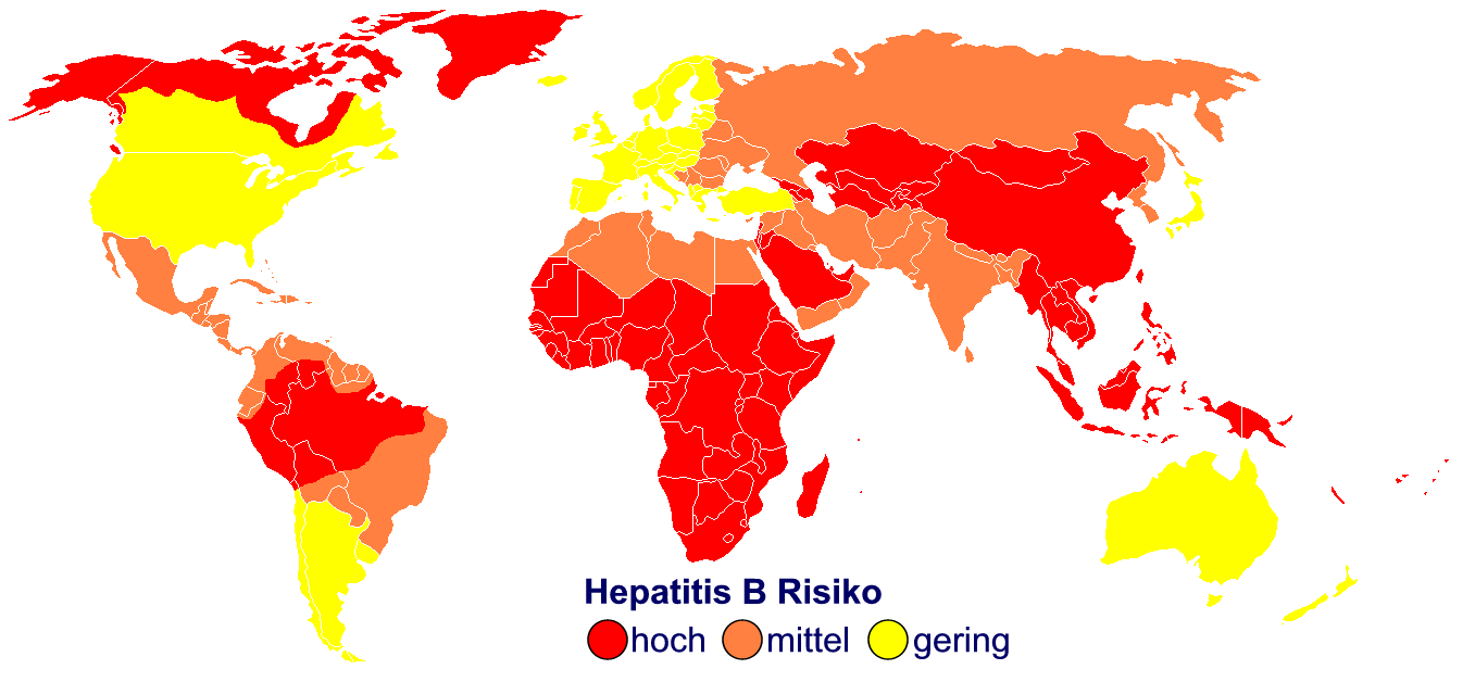 Verbreitung von Hepatitis B